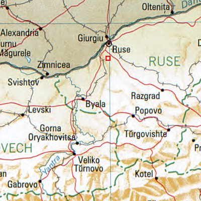 Iwanowo – Lage des Ortes in Bulgarien